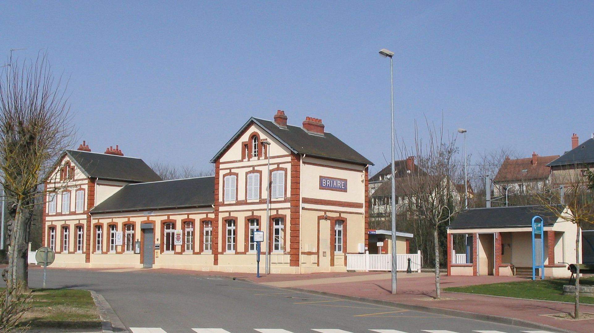 Gare de Briare (Briare, Loiret, France).